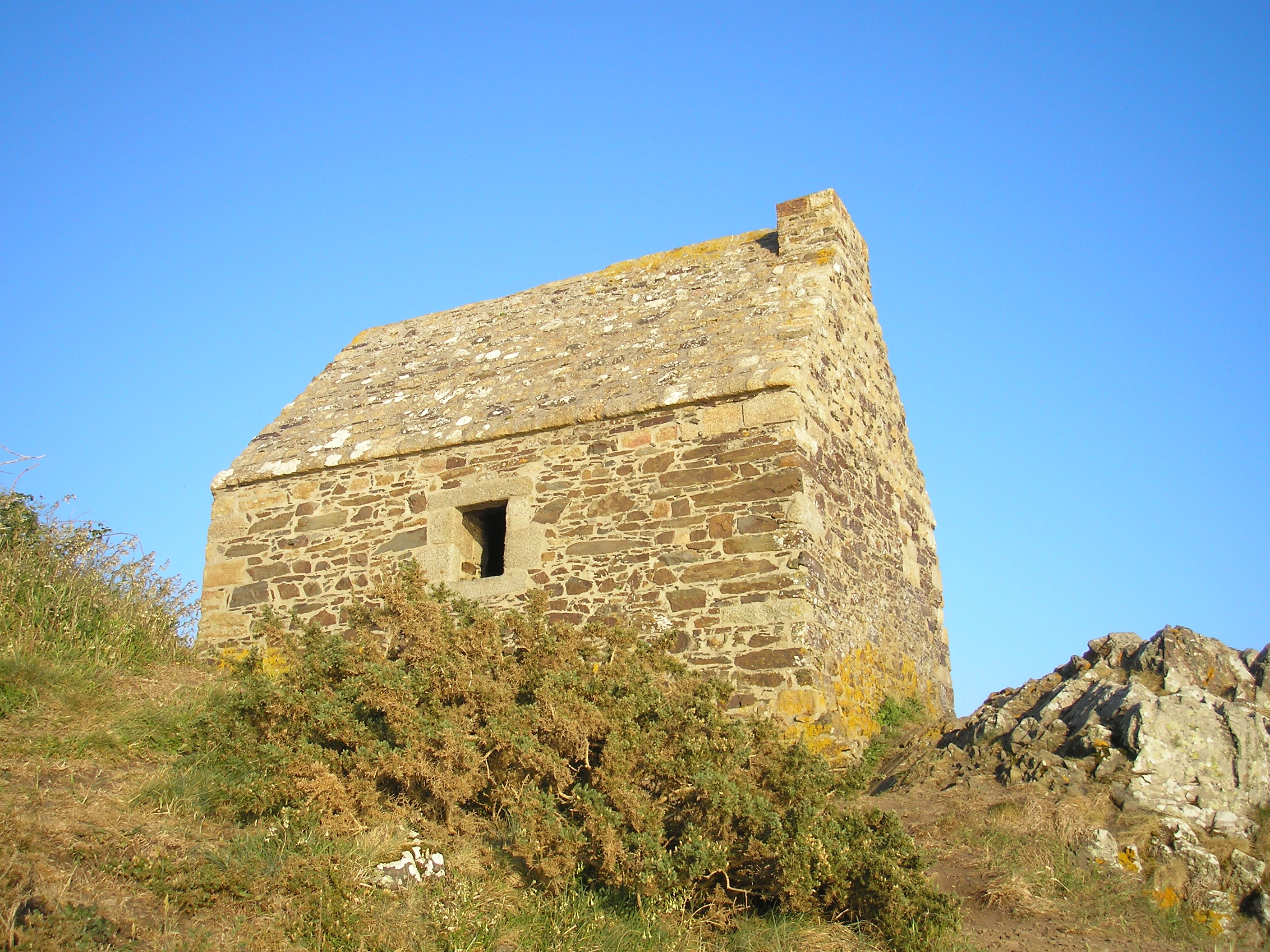 Carolles (Normandie, France). Cabane Vauban.